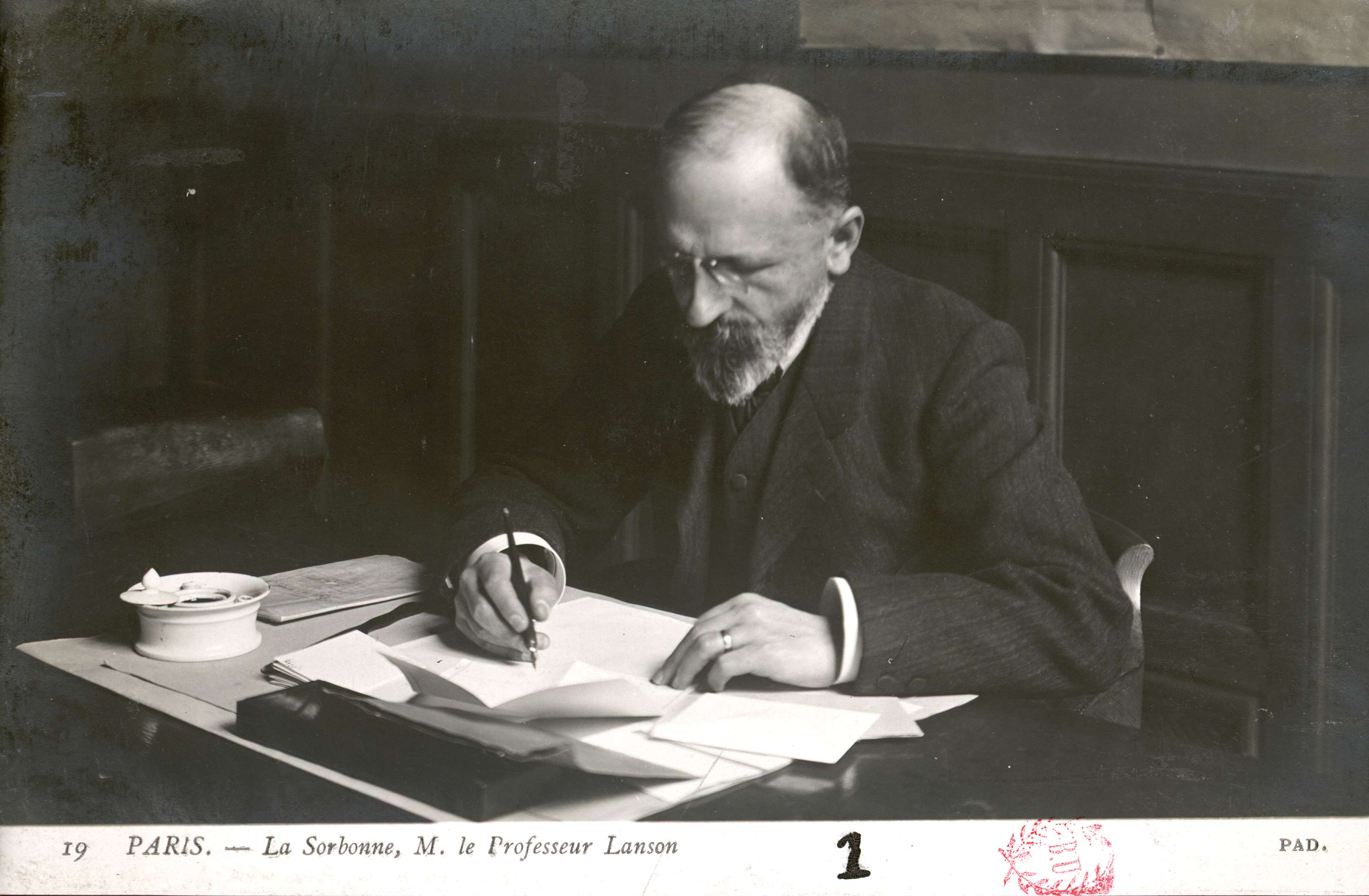 Carte postale photographique